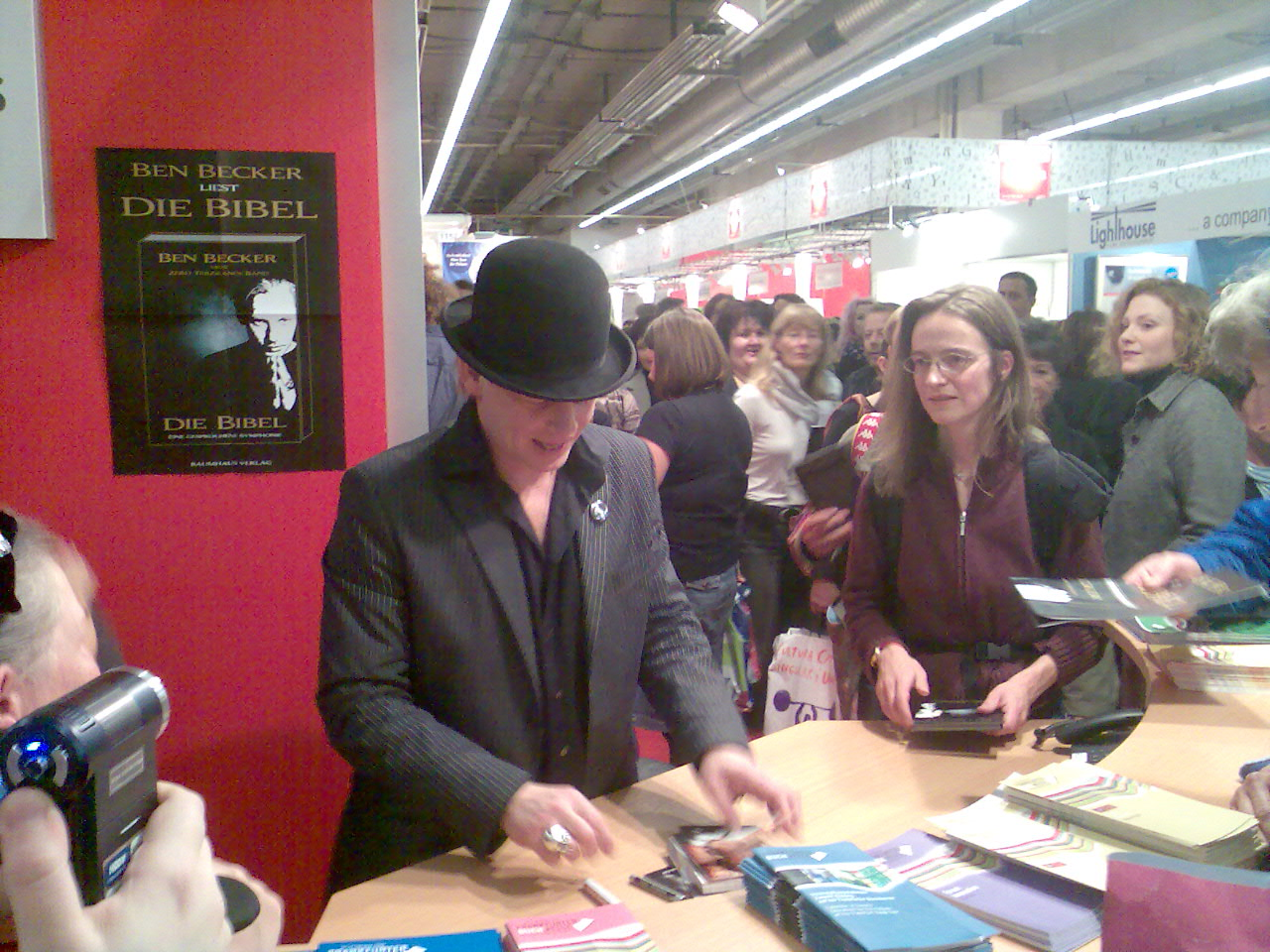 Ben Becker auf einer Buchmesse 2007